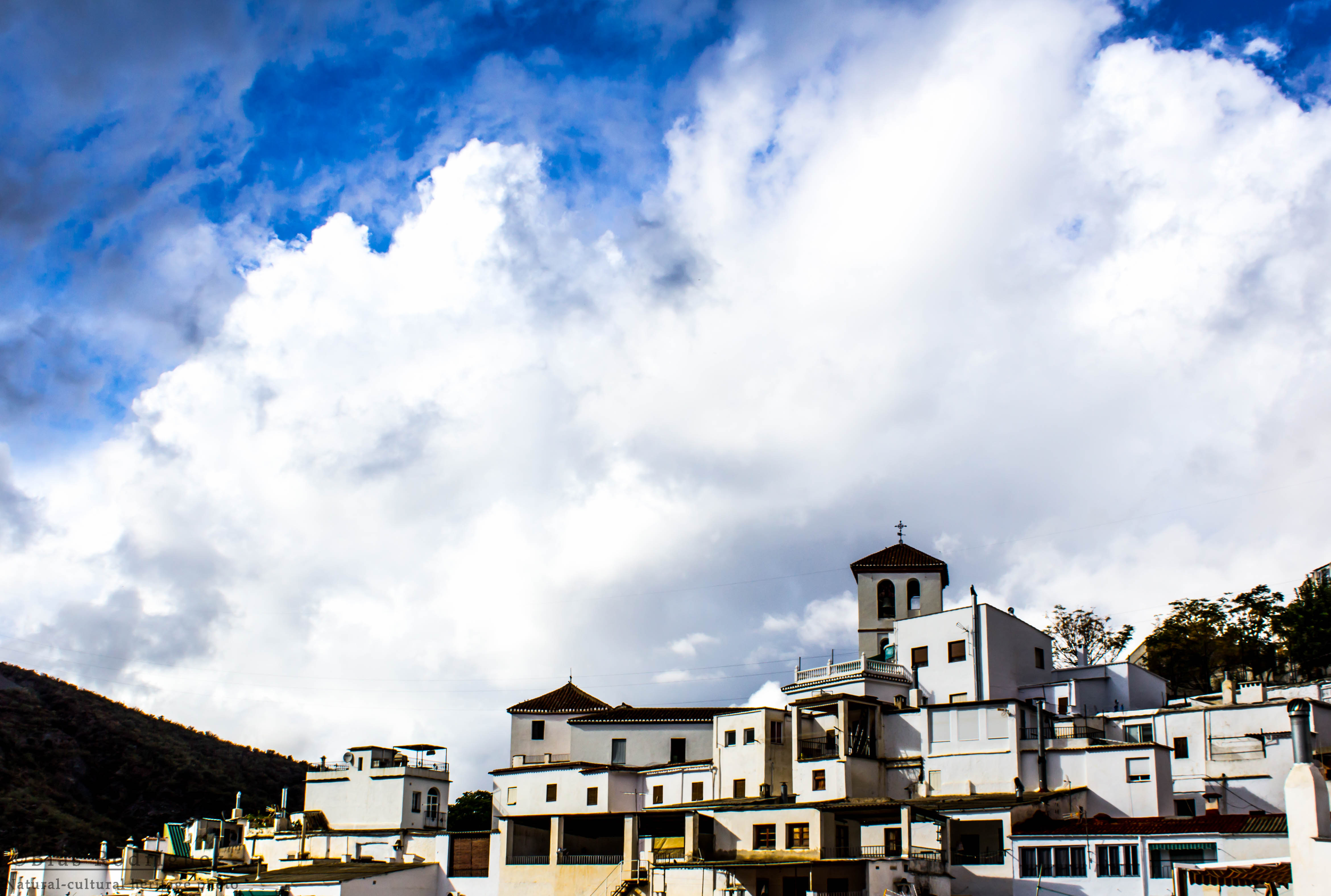 Torvizcón, barrio de la Iglesia